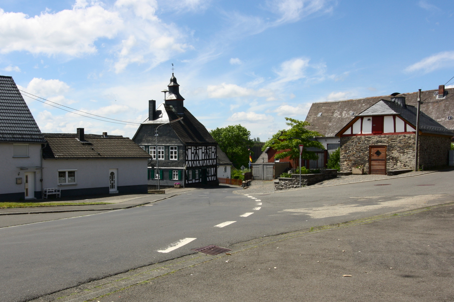 Waiganshain, Westerwald, Rheinland-Pfalz, Deutschland